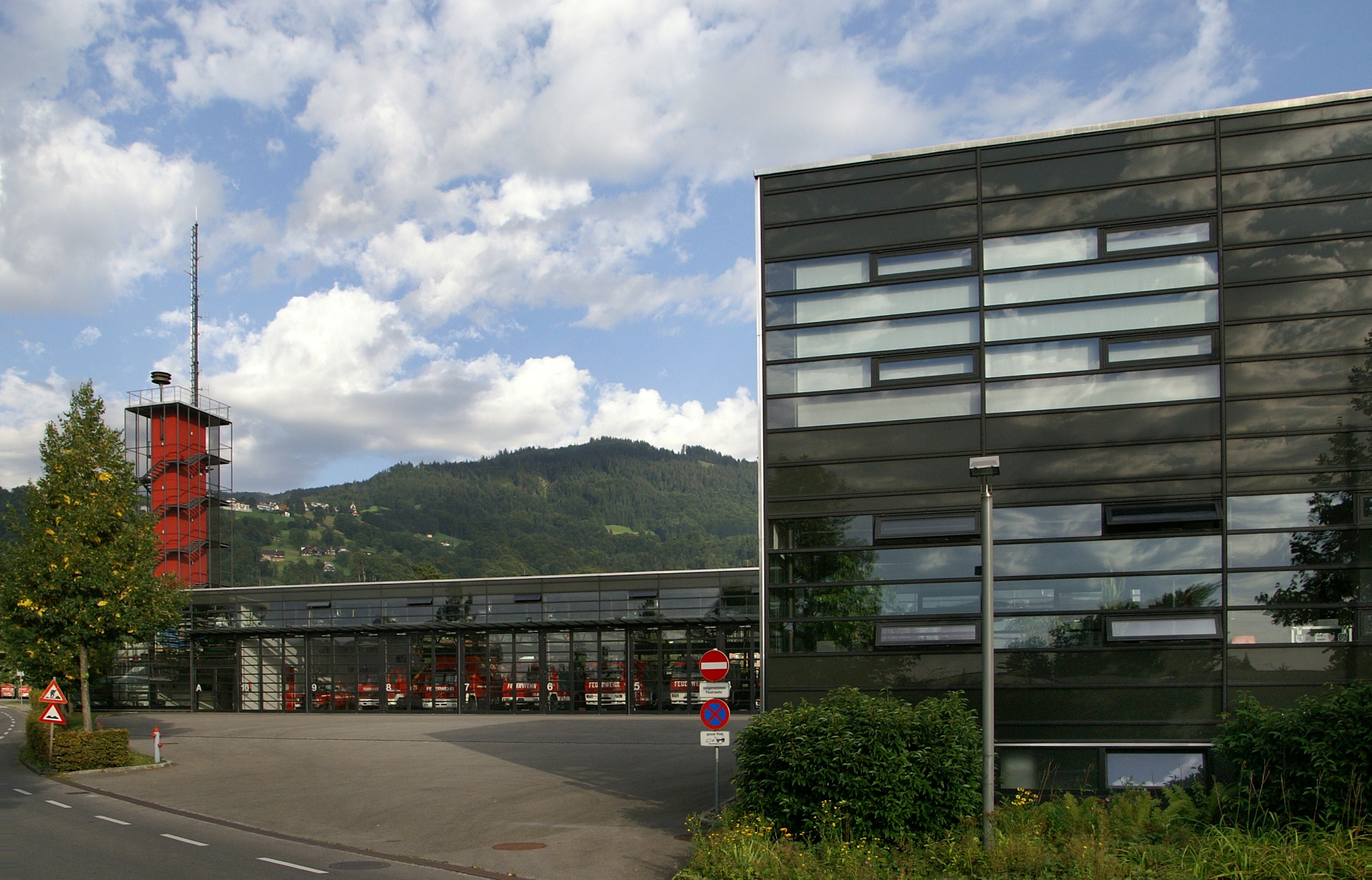 Feuerwehrzentrale Dornbirn.Planung: Atelier für Baukunst Dipl-Ing Wolfgang Ritsch